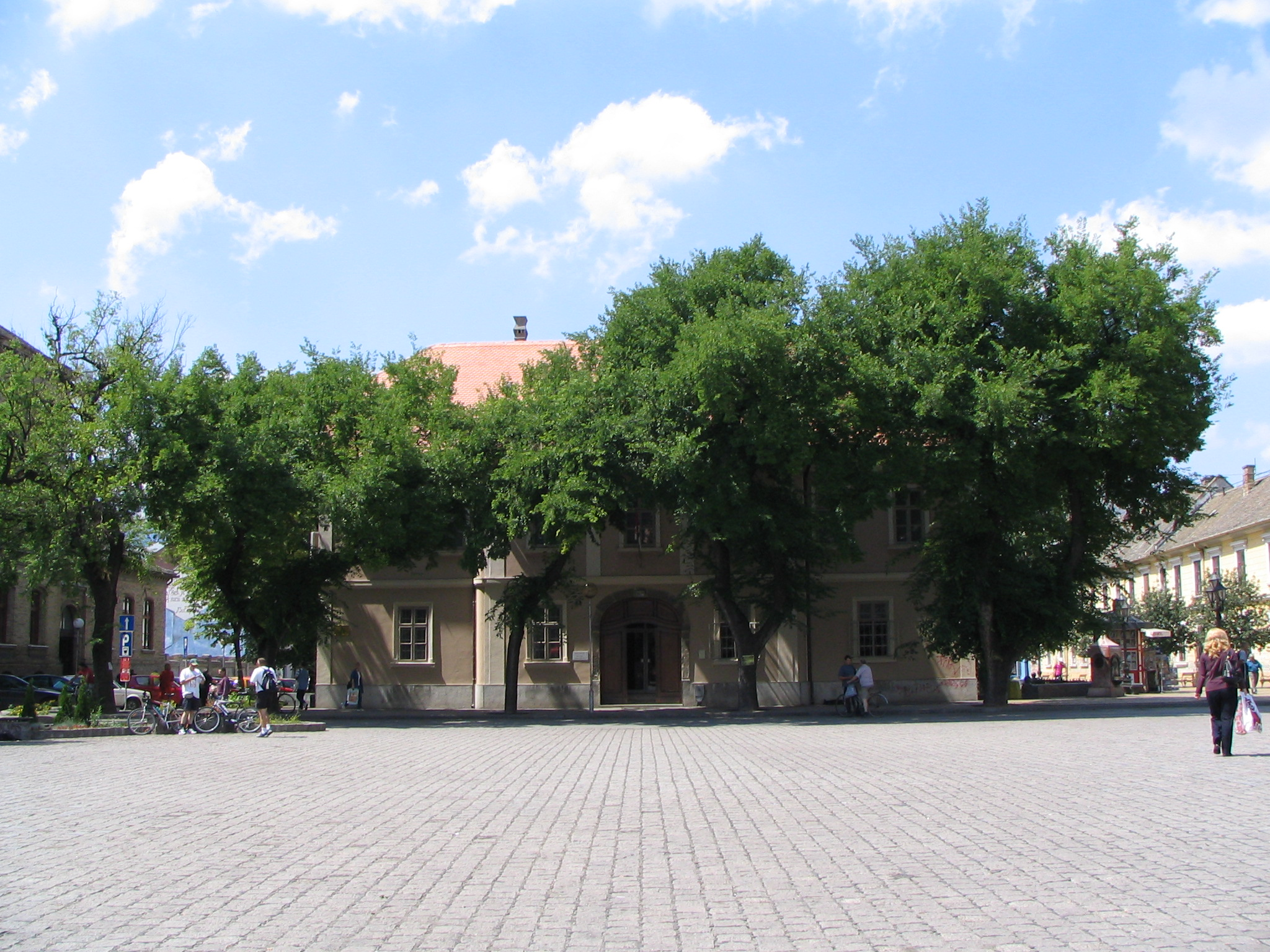 Галерија "Милан Коњовић", Сомбор, 7. јуни 2007. (фото: Михаило Грбић).